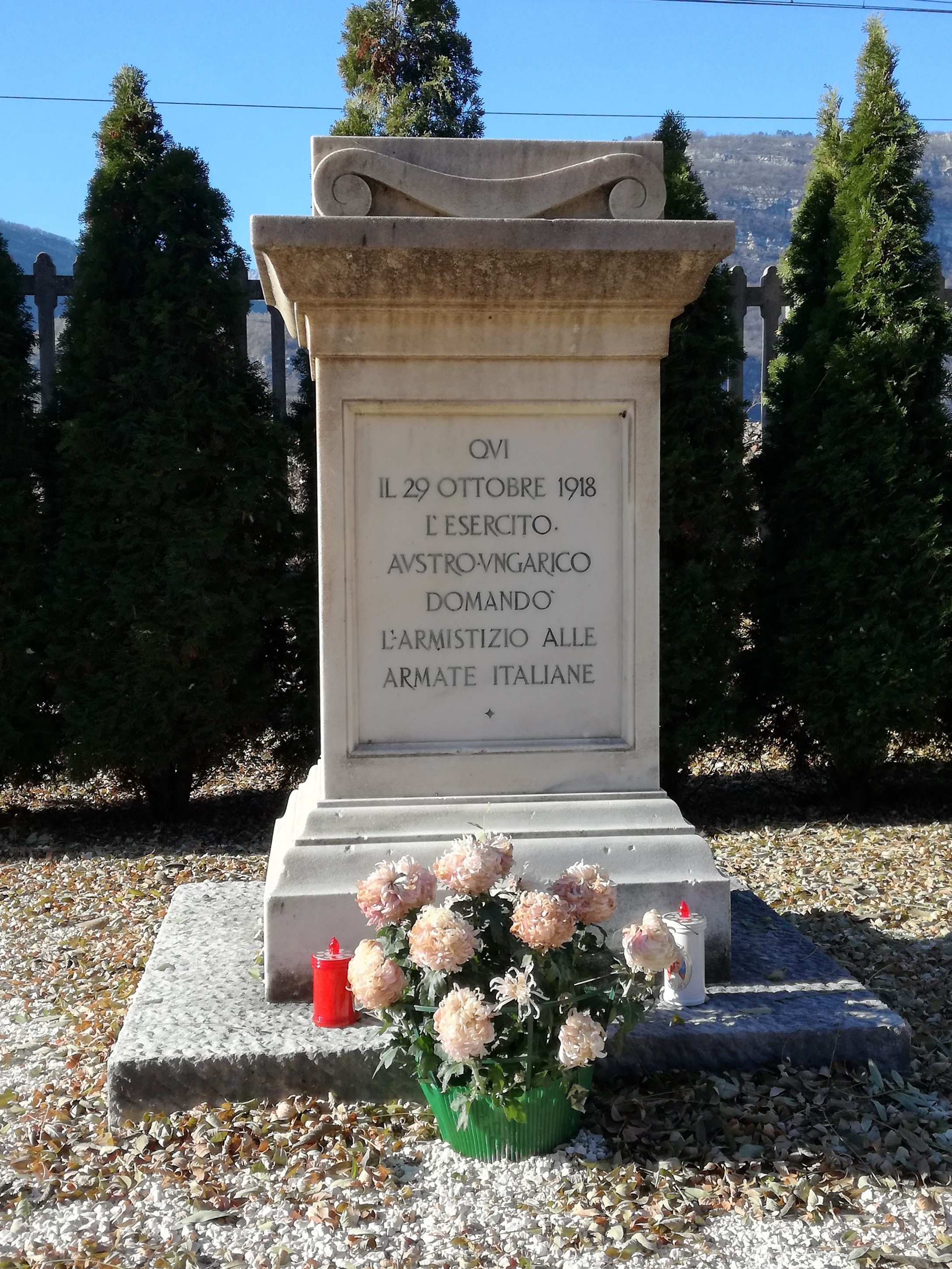 Gedenkstein an die Aufnahme der Waffenstillstandsverhandlungen zwischen Österreich-Ungarn und Italien vom 29. Oktober 1918 in Serravalle bei Ala (Trentino)